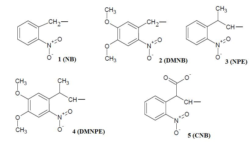 orto-nitrobensüül tüüpi valgustundlikud rühmad: 2-nitrobensüül (NB) 1, selle 4,5-dimetoksü analoog (DMNB) 2, 1-(2-nitrofenüül)etüül (NPE) 3 ja selle 4,5-dimetoksü analoog (DMNPE) 4 ning α-karboksü-2-nitrobensüül (CNB) rühmad 5. Neid ühendeid on kasutatud keemilises sünteesis kui fotolabiilseid prekursoreid.